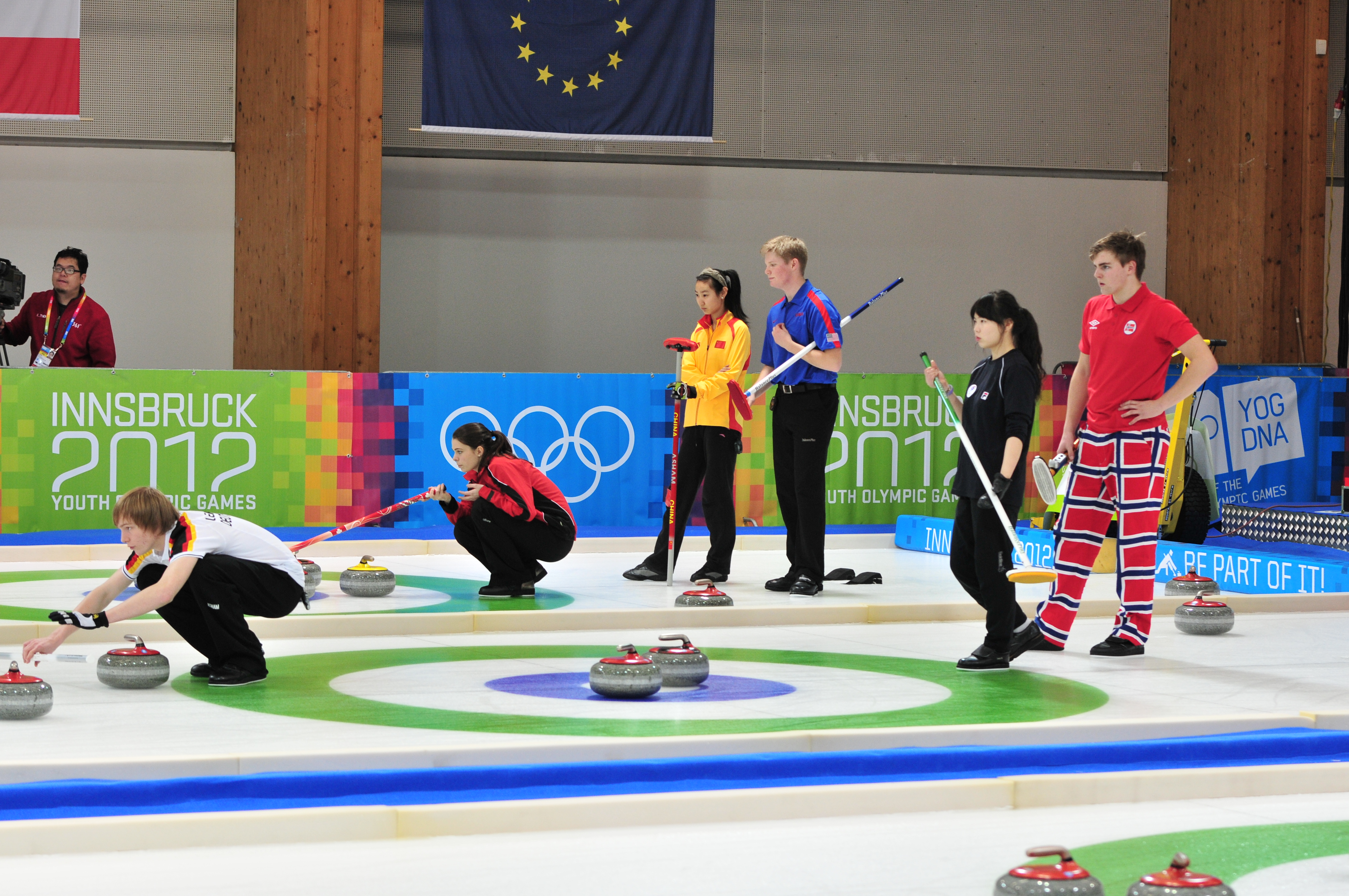 1. Jugendolympiade 2012 Innsbruck Erste Olympische Jugend- Winterspiele 201213. bis 22. Jänner in Innsbruck Dieses Foto wurde durch die Unterstützung von Wikimedia Österreich und die Twoonix Software GmbH ermöglicht.